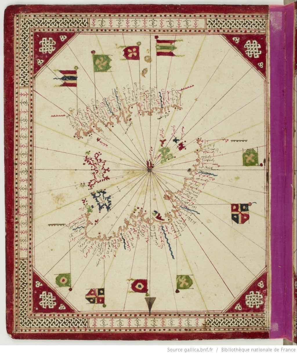 كتاب الطبلة